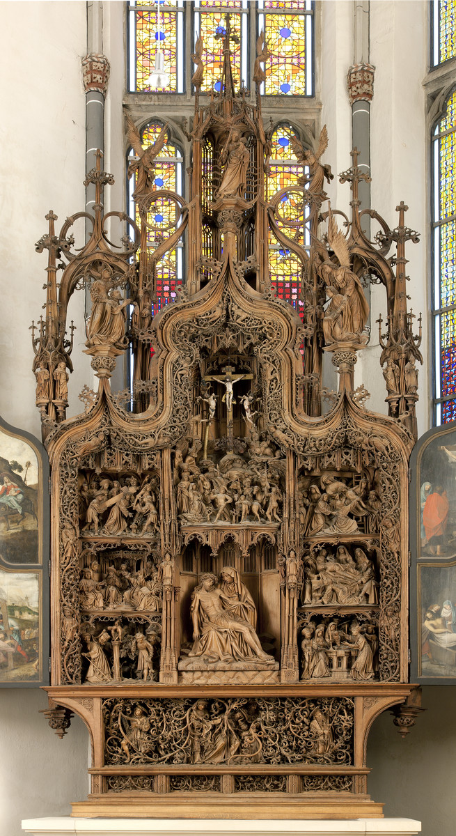 Douverman - Autel des sept douleurs Kalkar